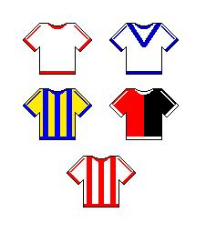 camisetas de los equipos que desean ser considerados como "el sexto grande" (Newell's Old Boys de Rosario, Rosario Central, Estudiantes de La Plata, Vélez Sarsfield y Huracán)